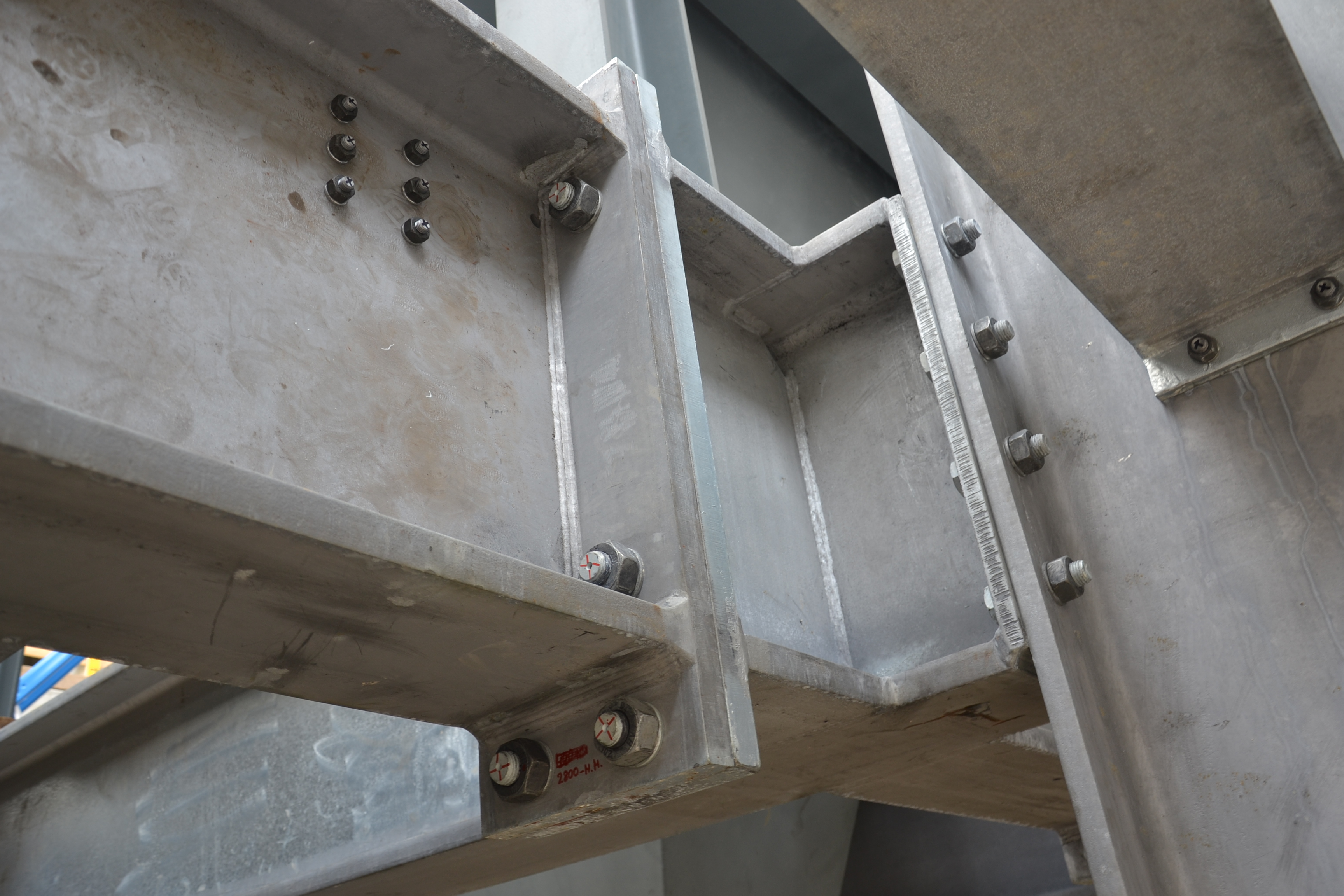 HV Schraubverbindung bei einen Stahlbau, Hochfest vorgespannte Verbindung